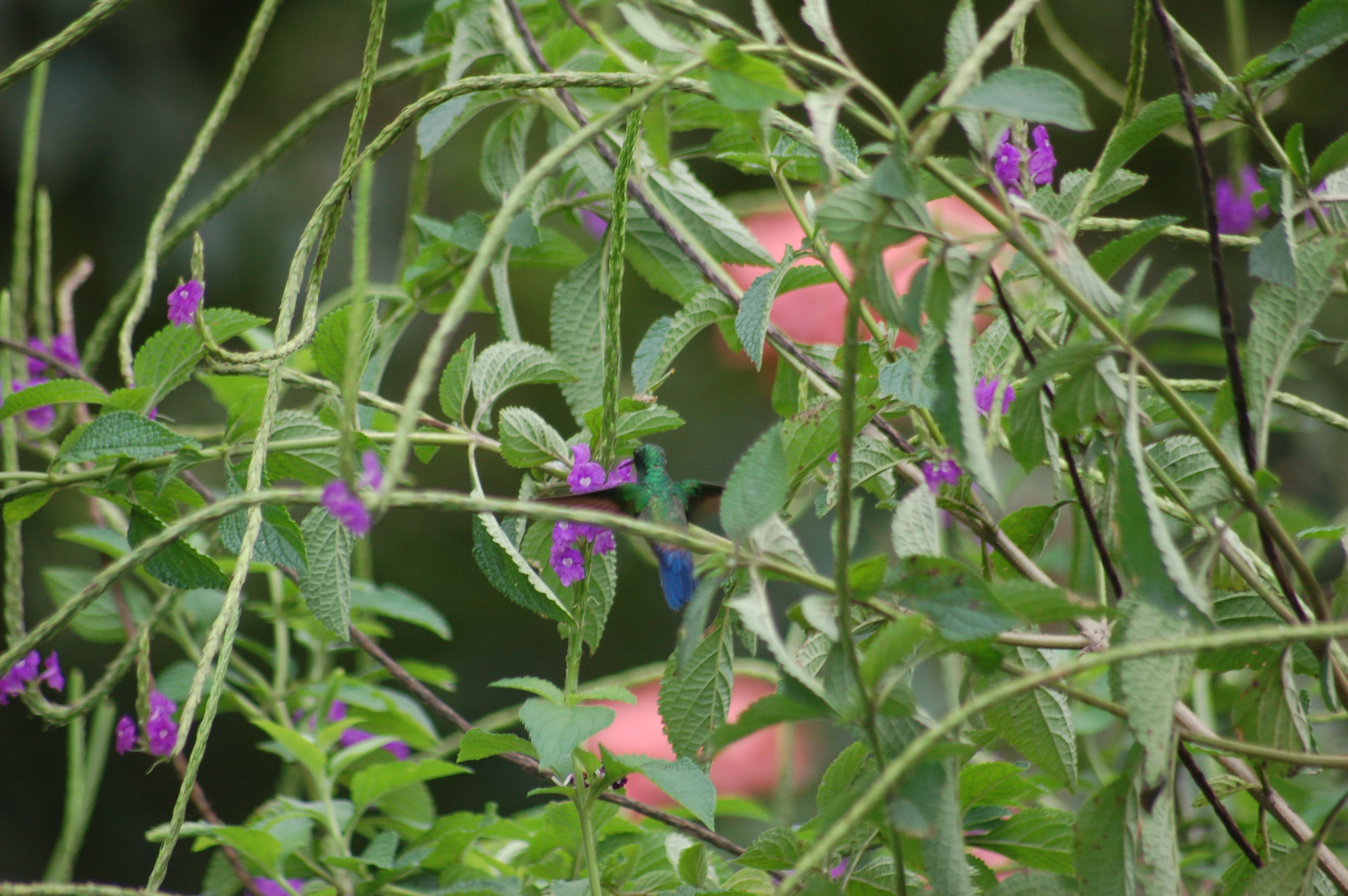 Kolibri, La Ecovilla, San Mateo, Costa Rica